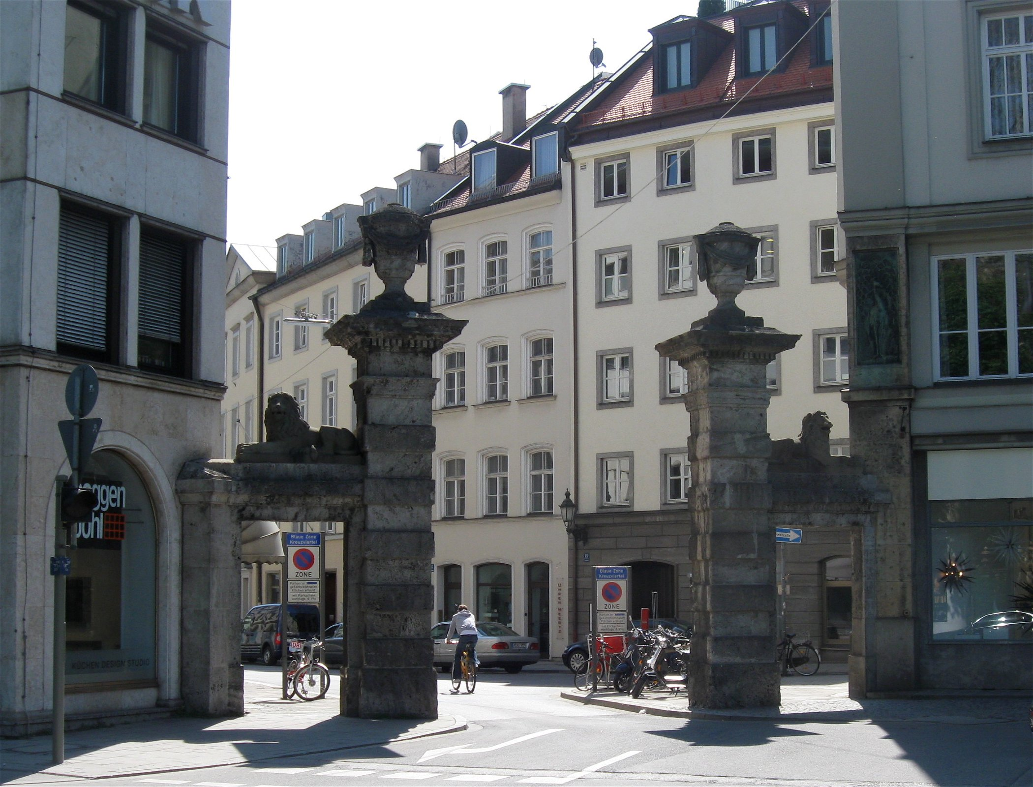 München, Maximiliansplatz, Maxtor I (mit Vasen bekrönte Torpfeiler und seitliche Durchgänge zwischen Nr. 17 und Nr. 18).